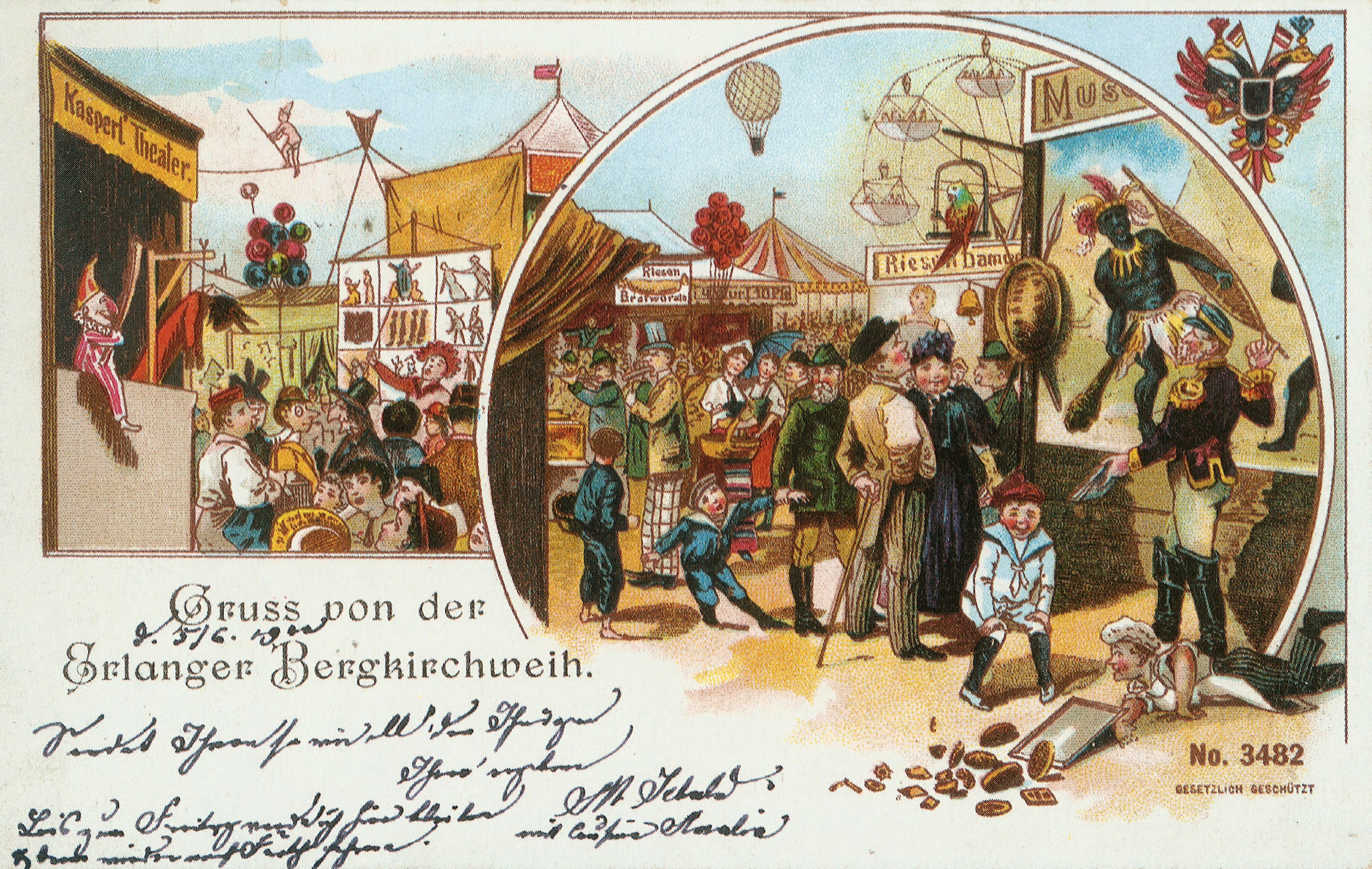 Postkarte zur Erlanger Bergkirchweih, um 1900